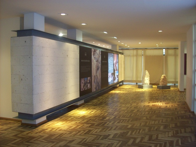 Museo de Arte Contemporaneo